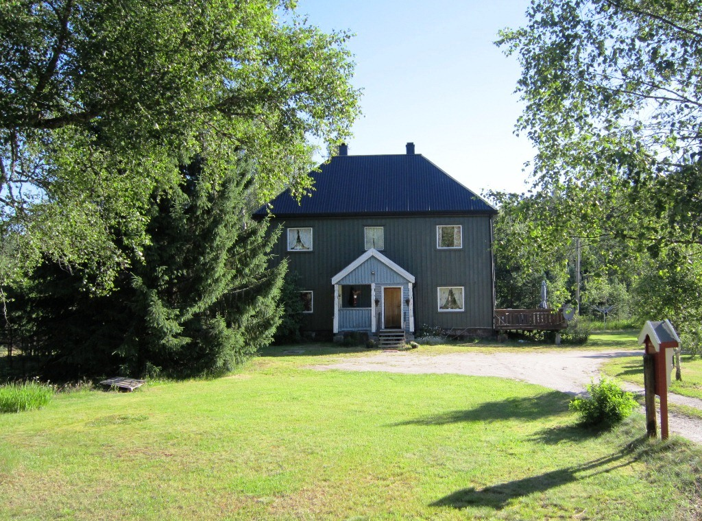 Øy stoppested på Treungenbanen